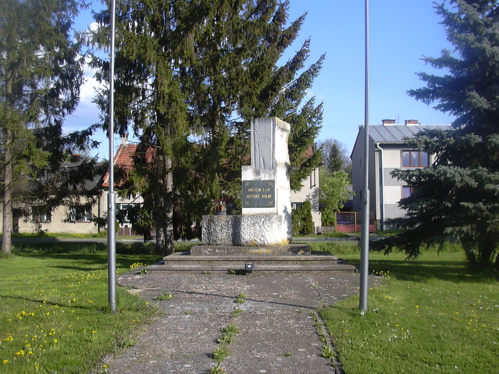 Pomník obětem 1. a 2. světové války Hlubočany (Vyškov District - Czech Republic)